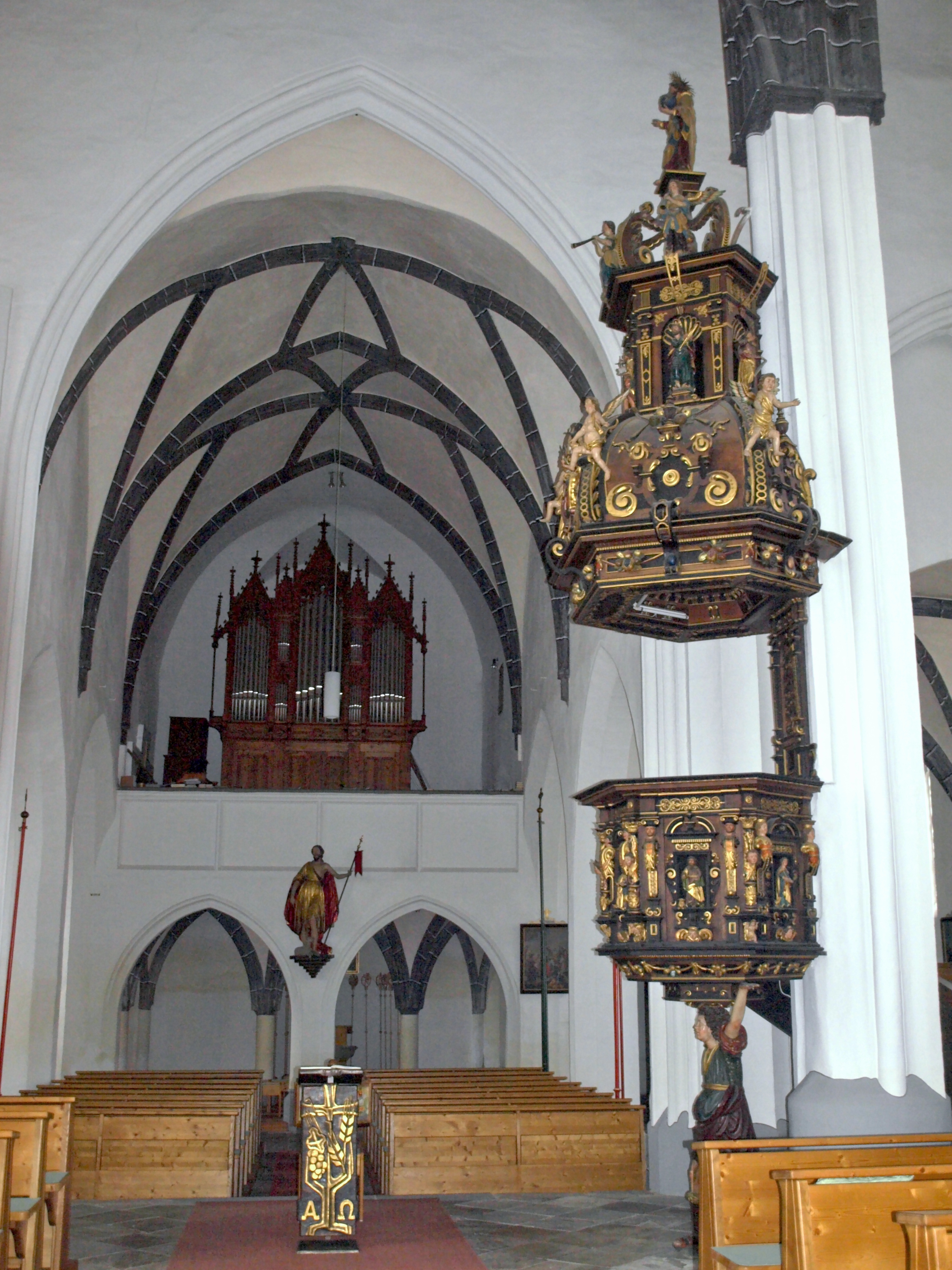 Kath. Pfarrkirche/ Wallfahrtskirche Mariae Himmelfahrt und Friedhof, Krenstetten, Aschbach